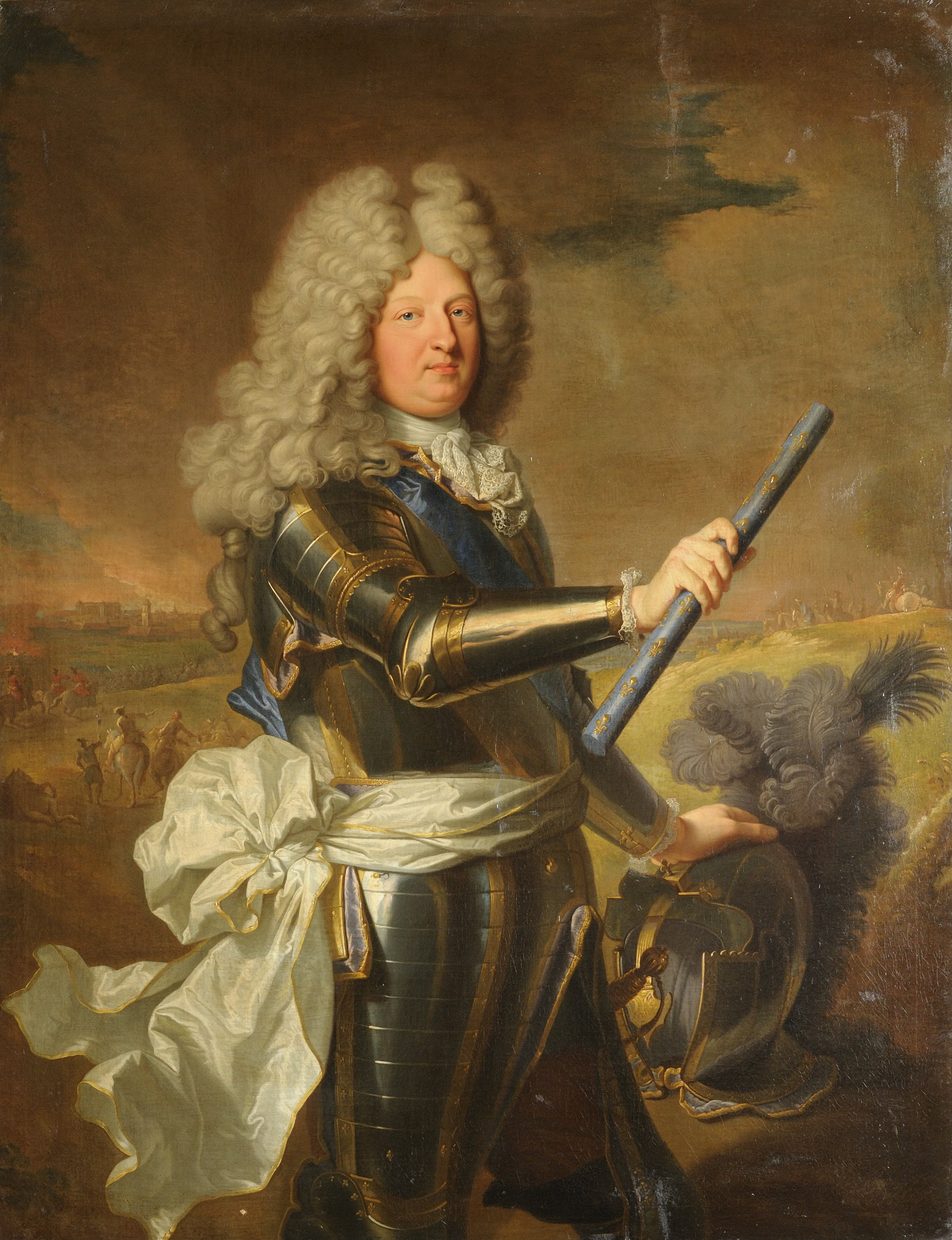 en armure, la taille ceinte de l'echarpe de commandement et levant de la main droite le bâton de maréchal. Présenté devant le siège de Philipsbourg en 1688